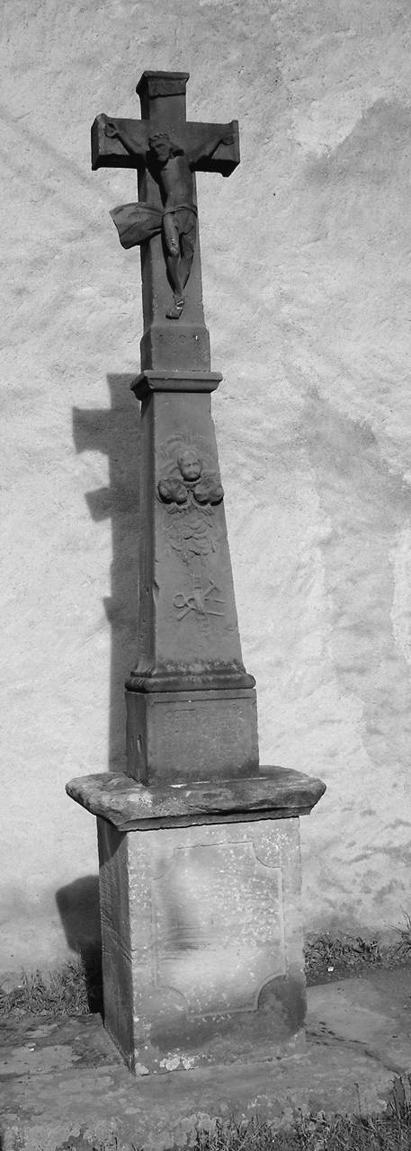 croix de carrefour en grès rose - rue Paul Langevin à Raon-l'Étape 88372